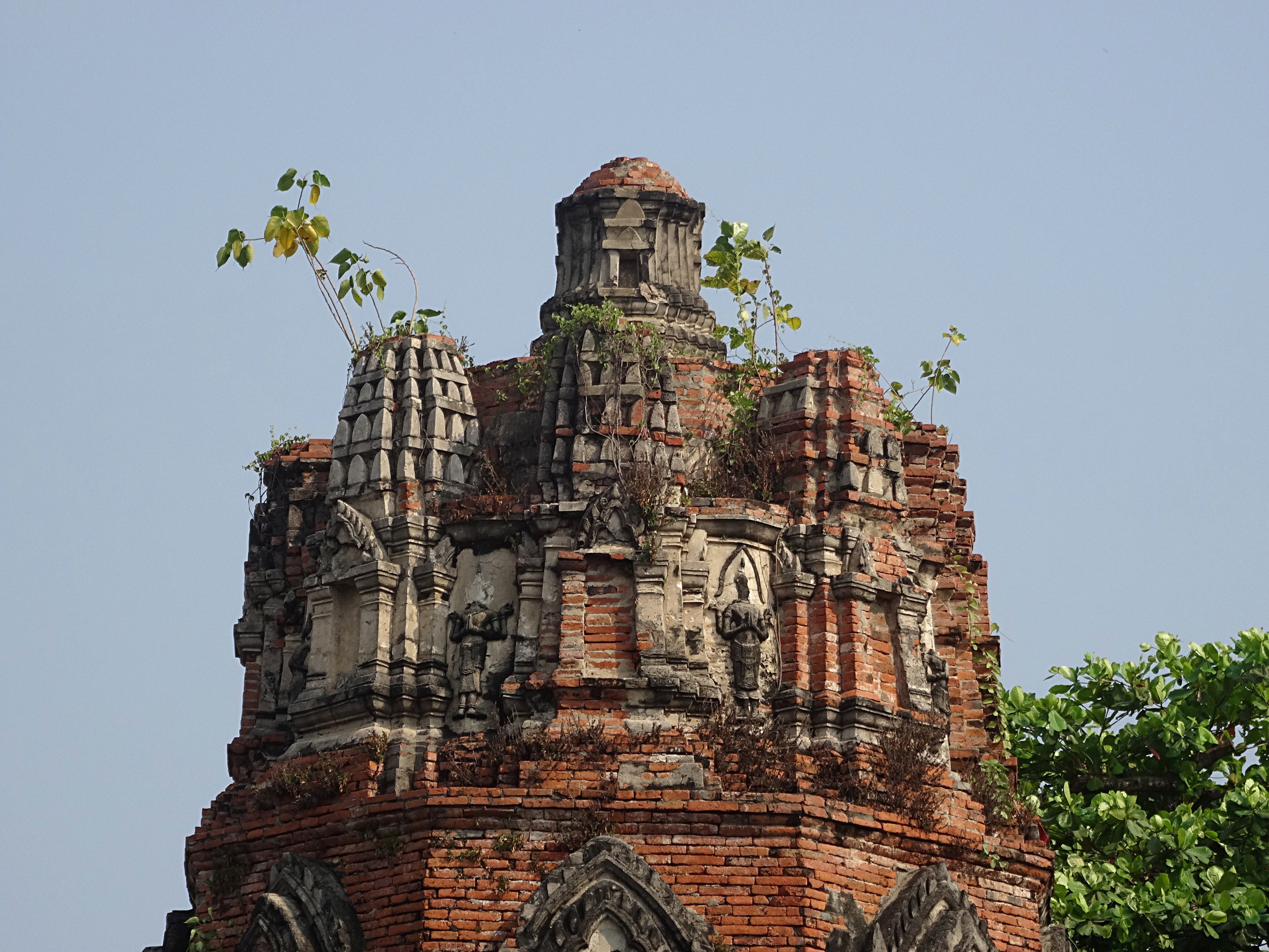 Spitze eines Prang (Buddhistischer Tempelturm) im Wat Mahathat Ayutthaya